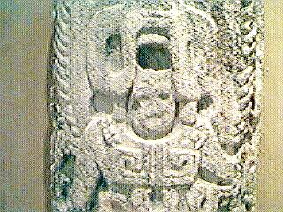 Detalle de una estela maya exibida en el Museo de la Soledad, Campeche, Mexico.